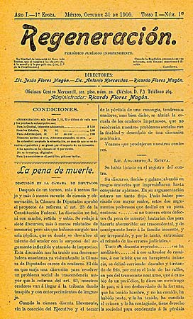 Una de las primeras copias de Regeneración, el periódico dirigido por los hermanos Flores Magón. El ejemplar fue publicado en el año es:1900 y se considera en el dominio público en los Estados Unidos.